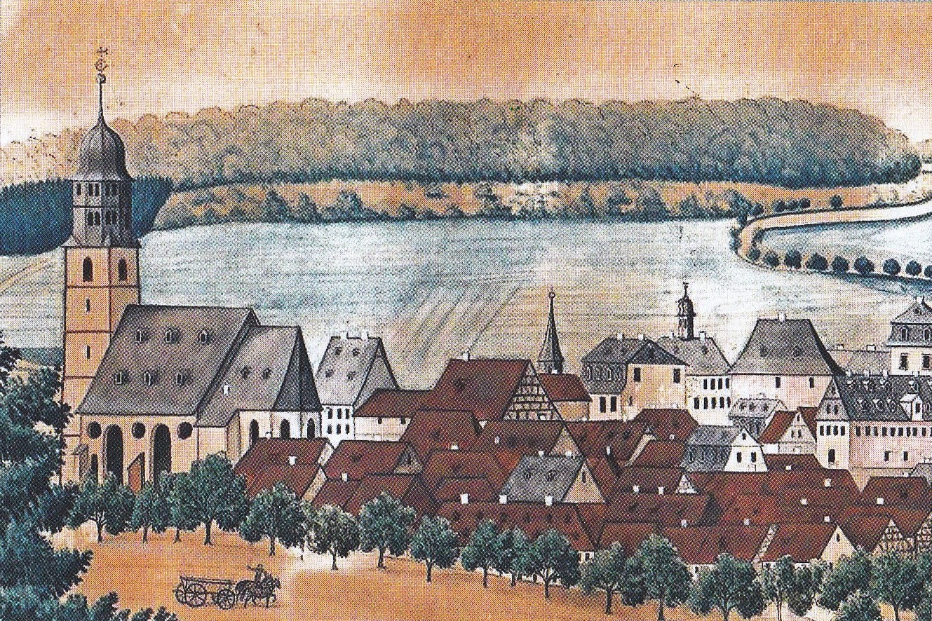 Aquarell von Ludwig Friedrich Dienstbach um 1830: Usingen von Südosten